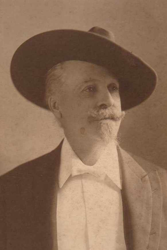 Buffalo Bill licence